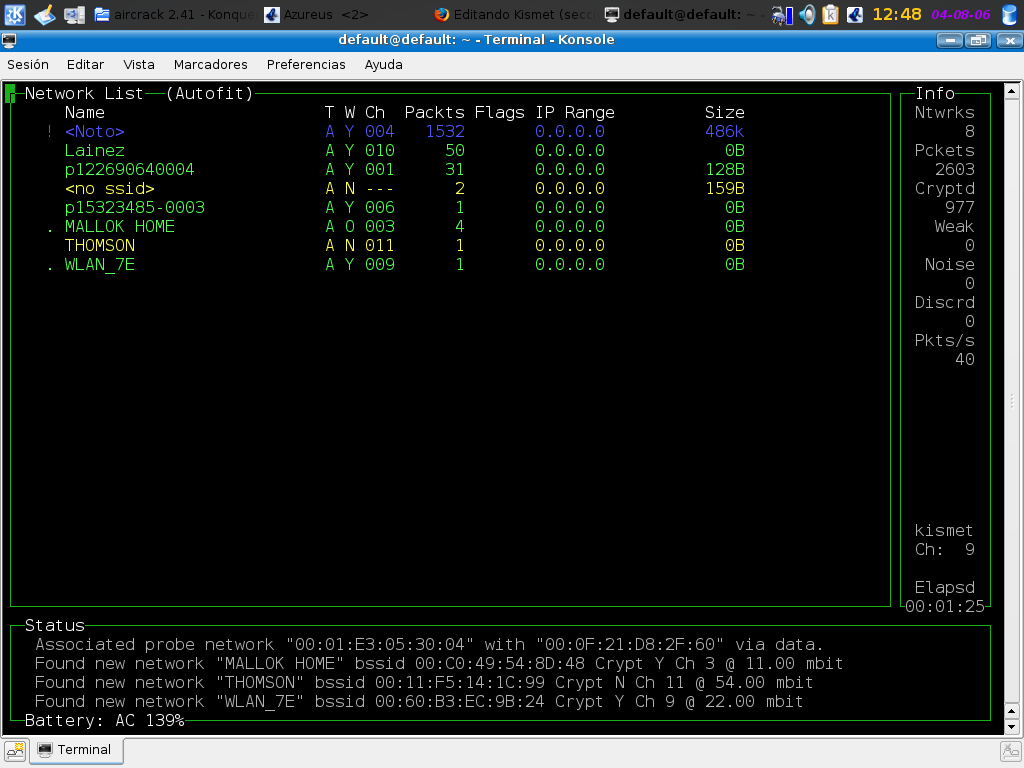 Imagen en acción del sniffer Kismet para redes inalámbricas